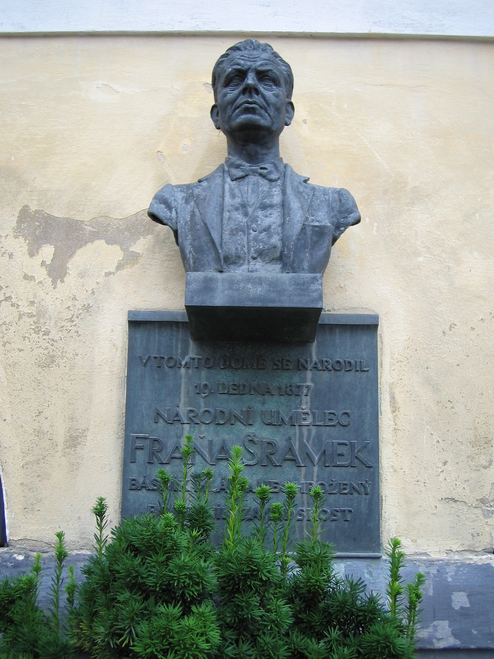 plaque on Czech poet Fráňa Šrámek's native house in Sobotka